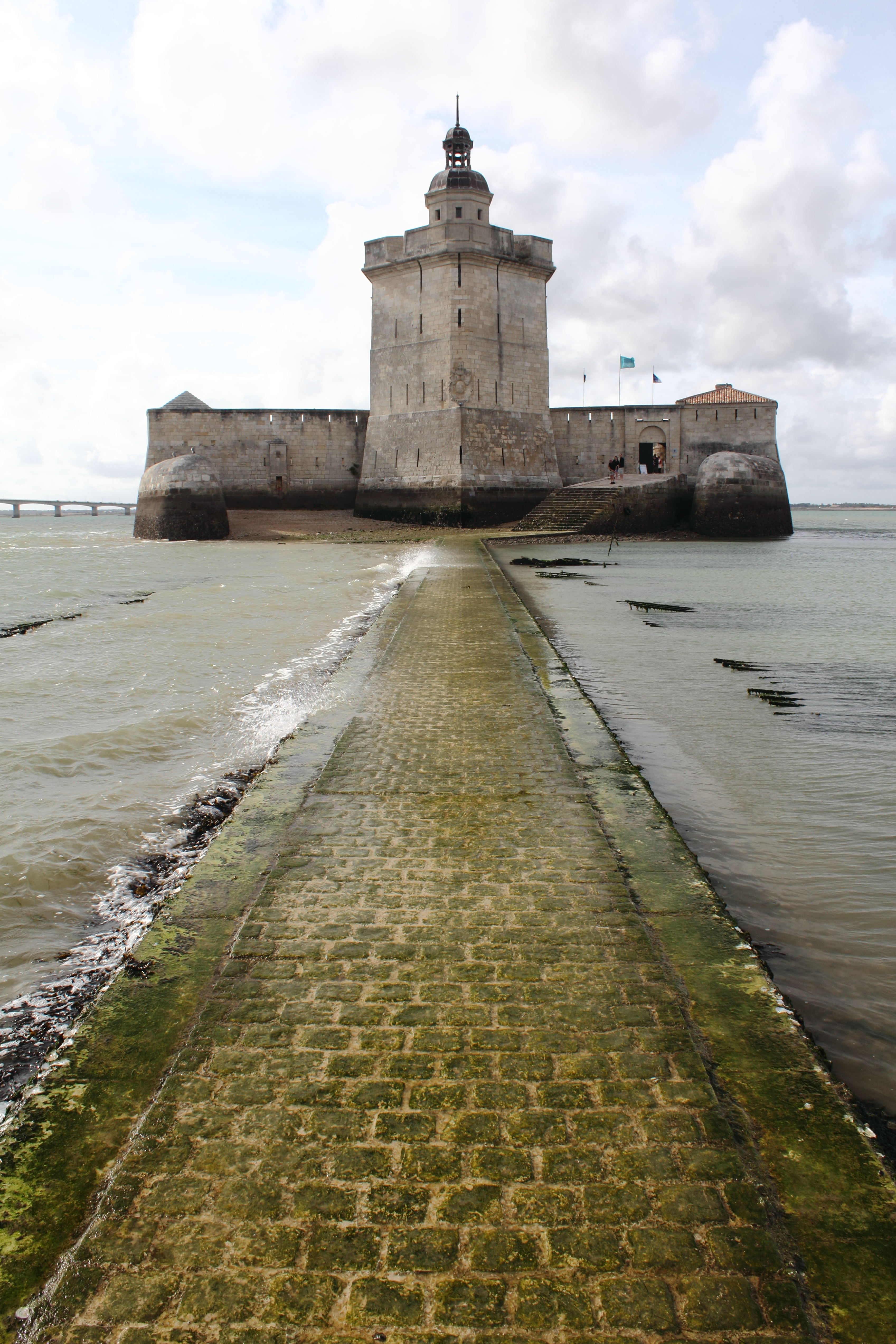 Photo du Fort Louvois avec en premier plan le chemin d’accès à pied juste après avoir été découvert par la marée descendante.